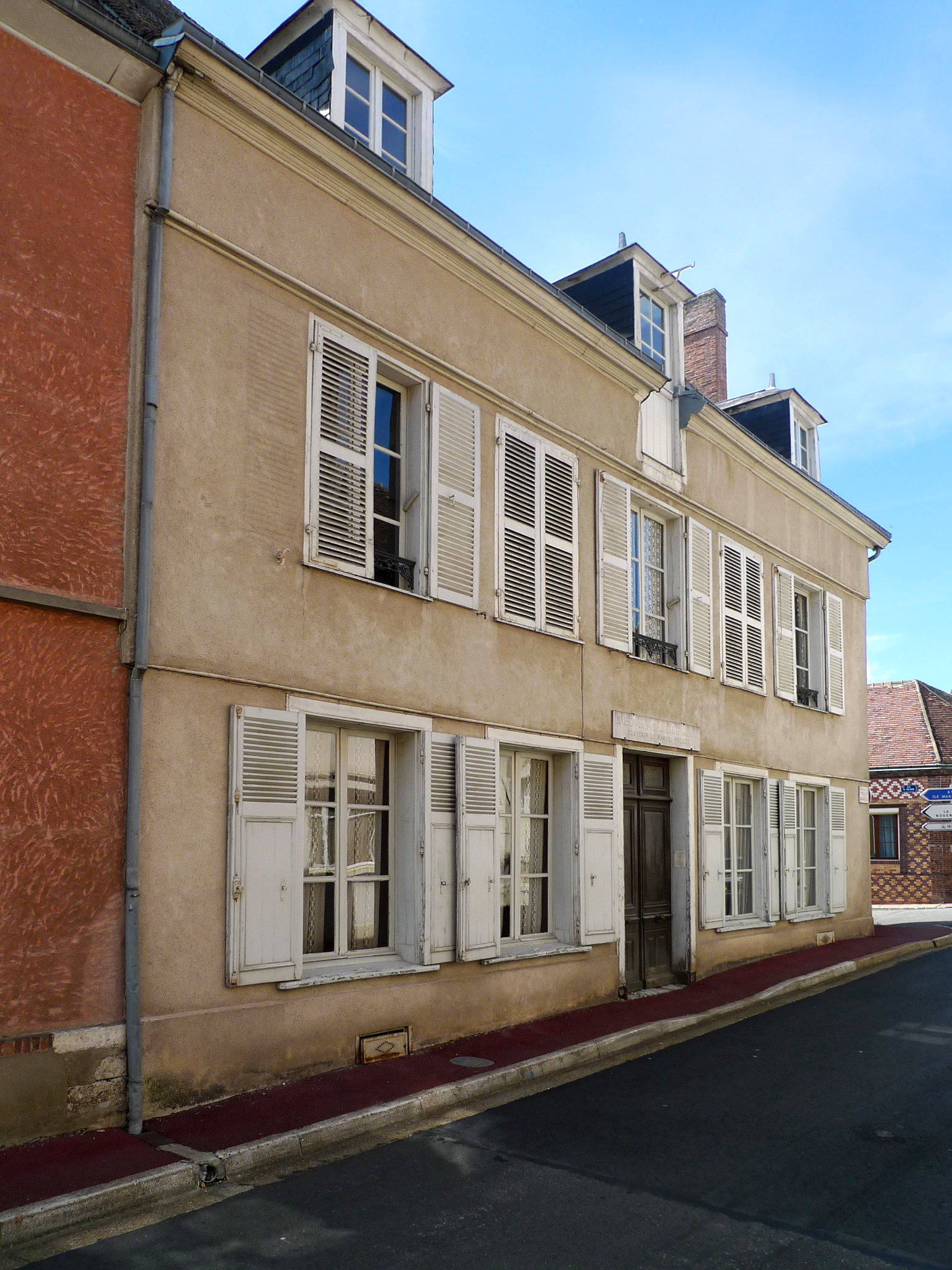 Rückseite des Hauses der Tante Leonie